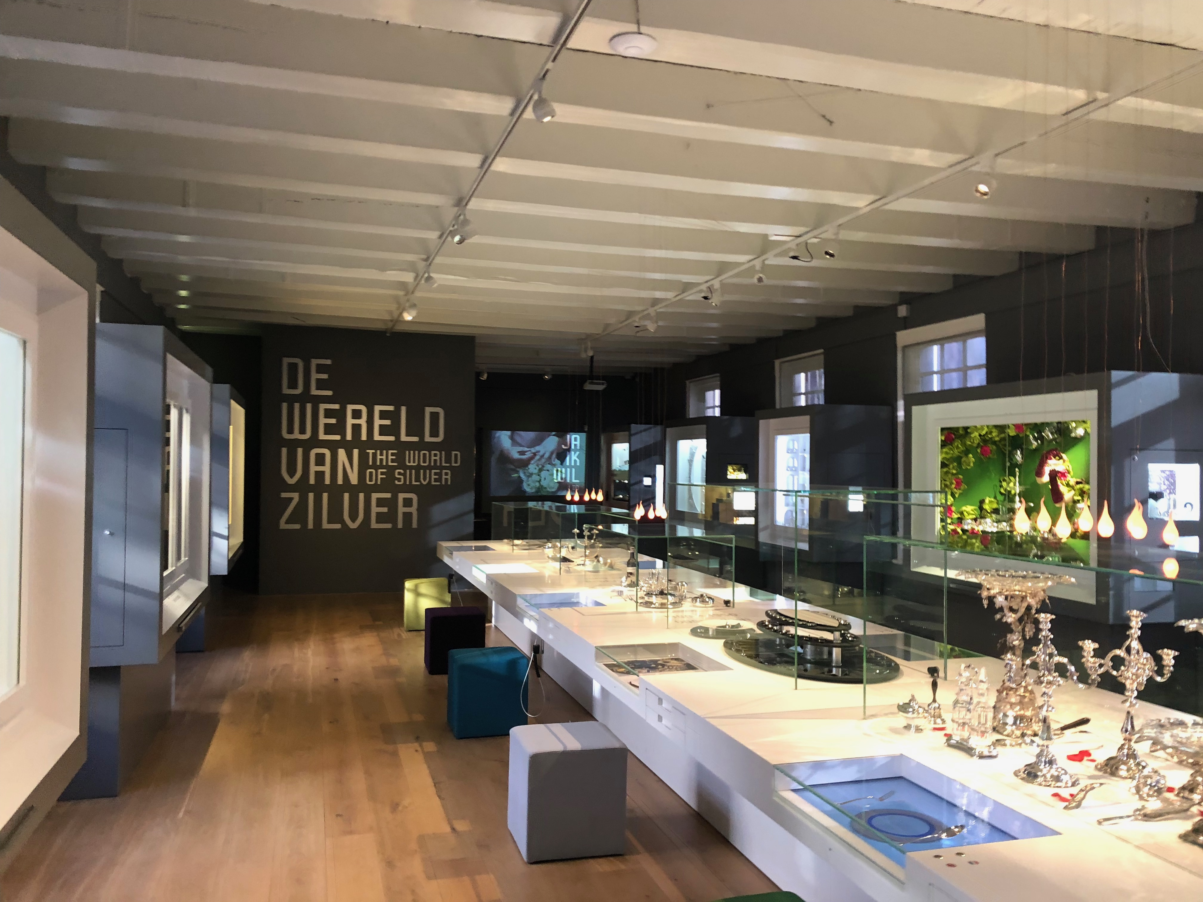 Interieur Zilvermuseum Schoonhoven